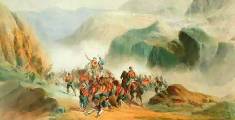 I Cacciatori delle Alpi a Calatafimi (15 maggio 1860)